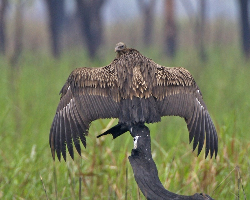 White-rumped Vulture - juvenile Gyps bengalensis Kazaringa, Assam, India April 14, 2008